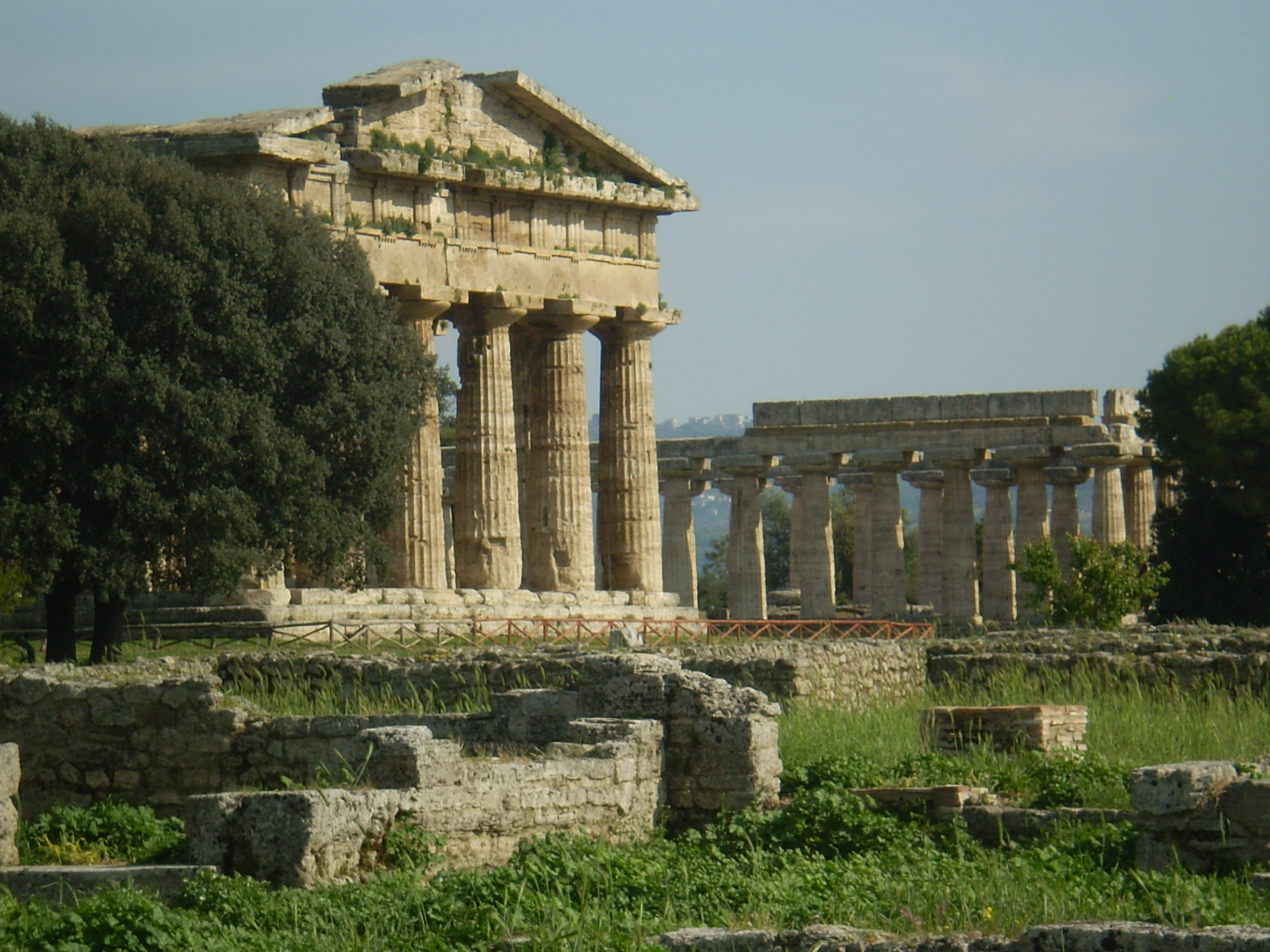 Tempio della Pace This is a photo of a monument which is part of cultural heritage of Italy.